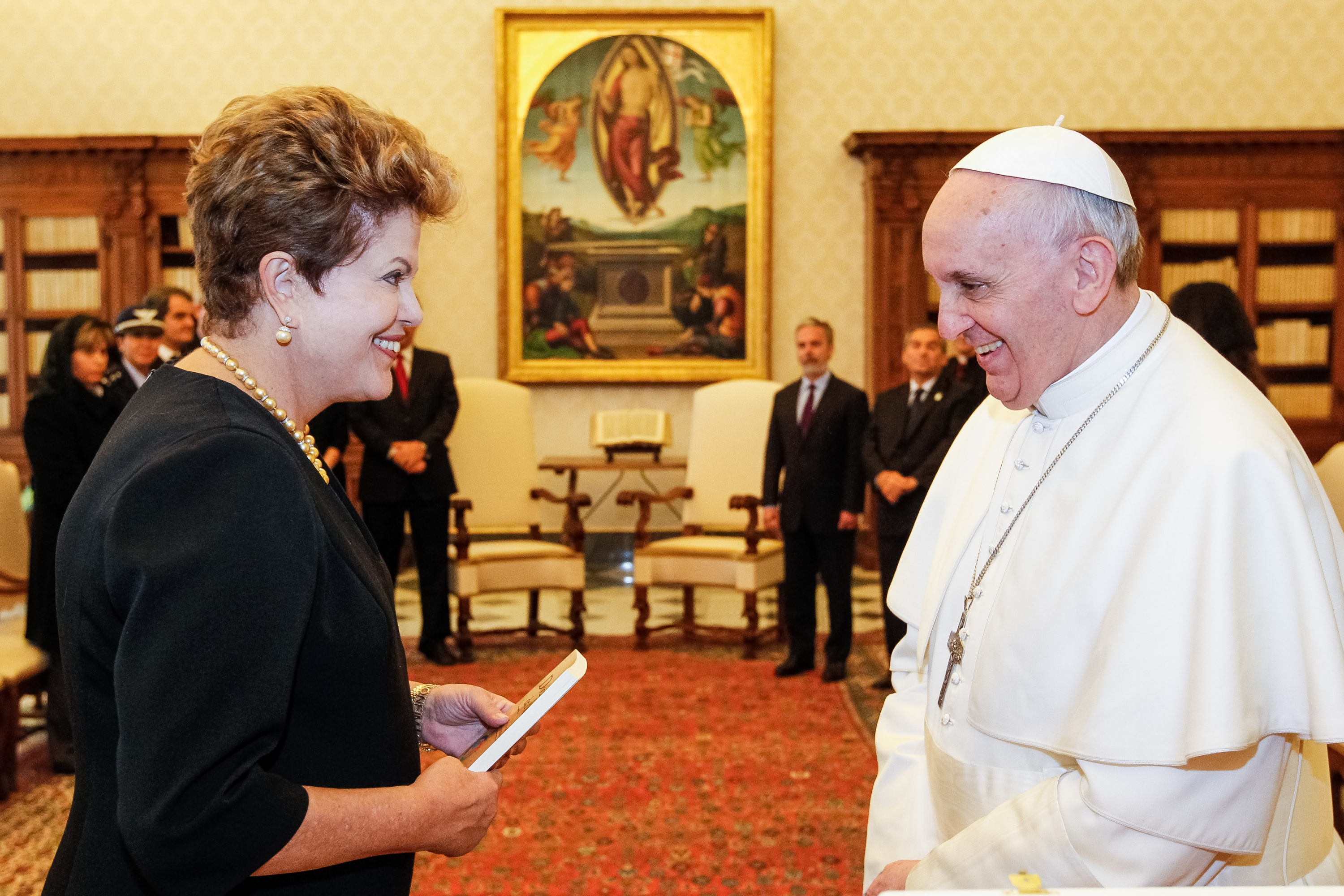 Presidenta Dilma Rousseff durante encontro o papa Francisco, no Palácio Apostólico